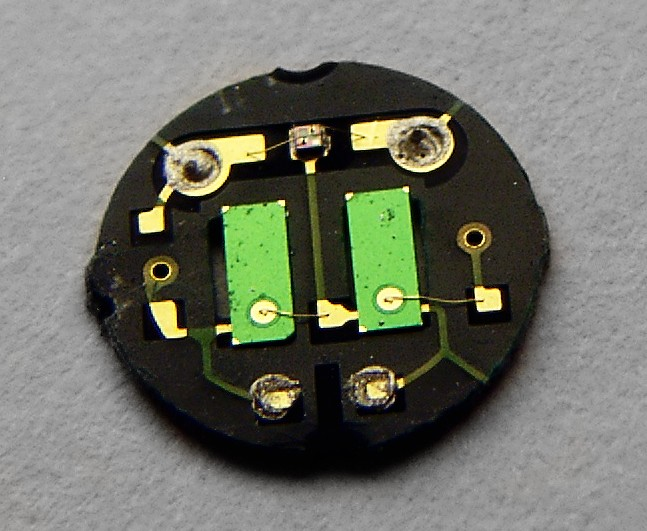 Pyroelektrischer Sensor für Bewegungsmelder